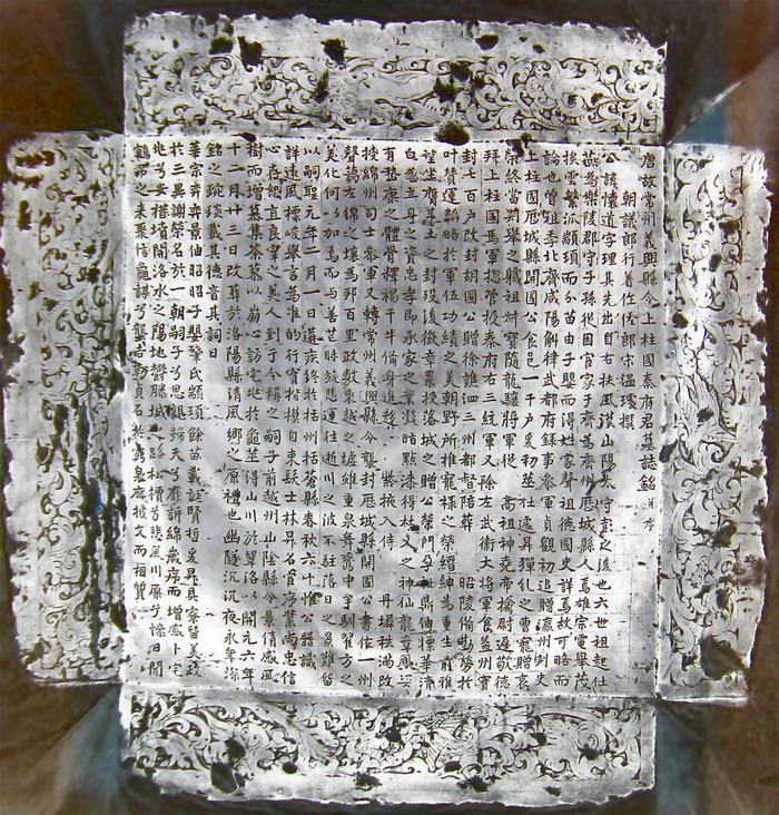 我所拍的图片